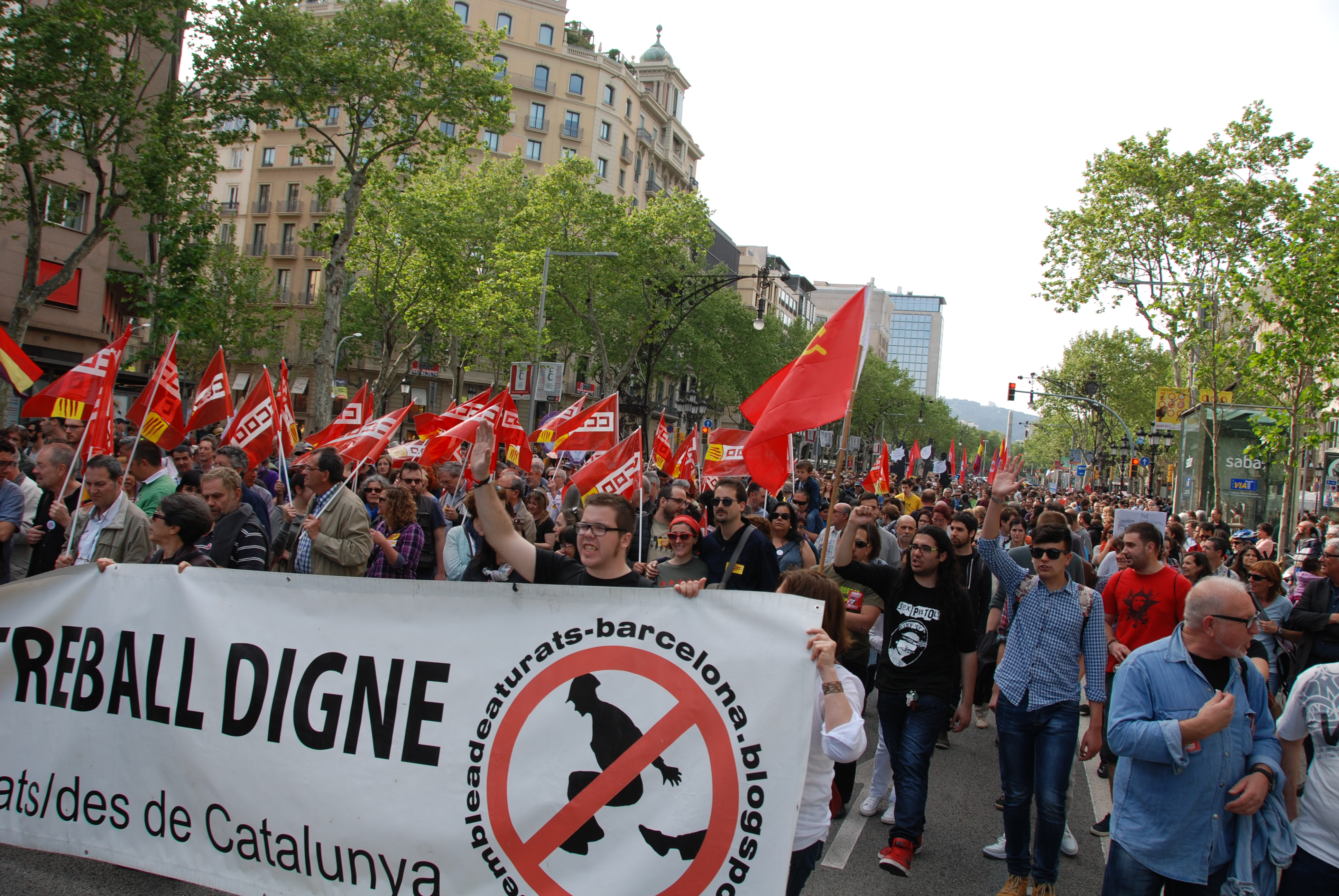 CCOO estuvo allí